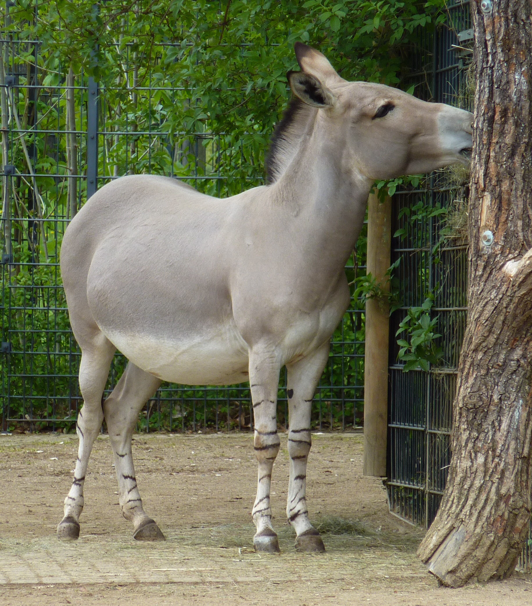 Somaliwildesel in der Wilhelma